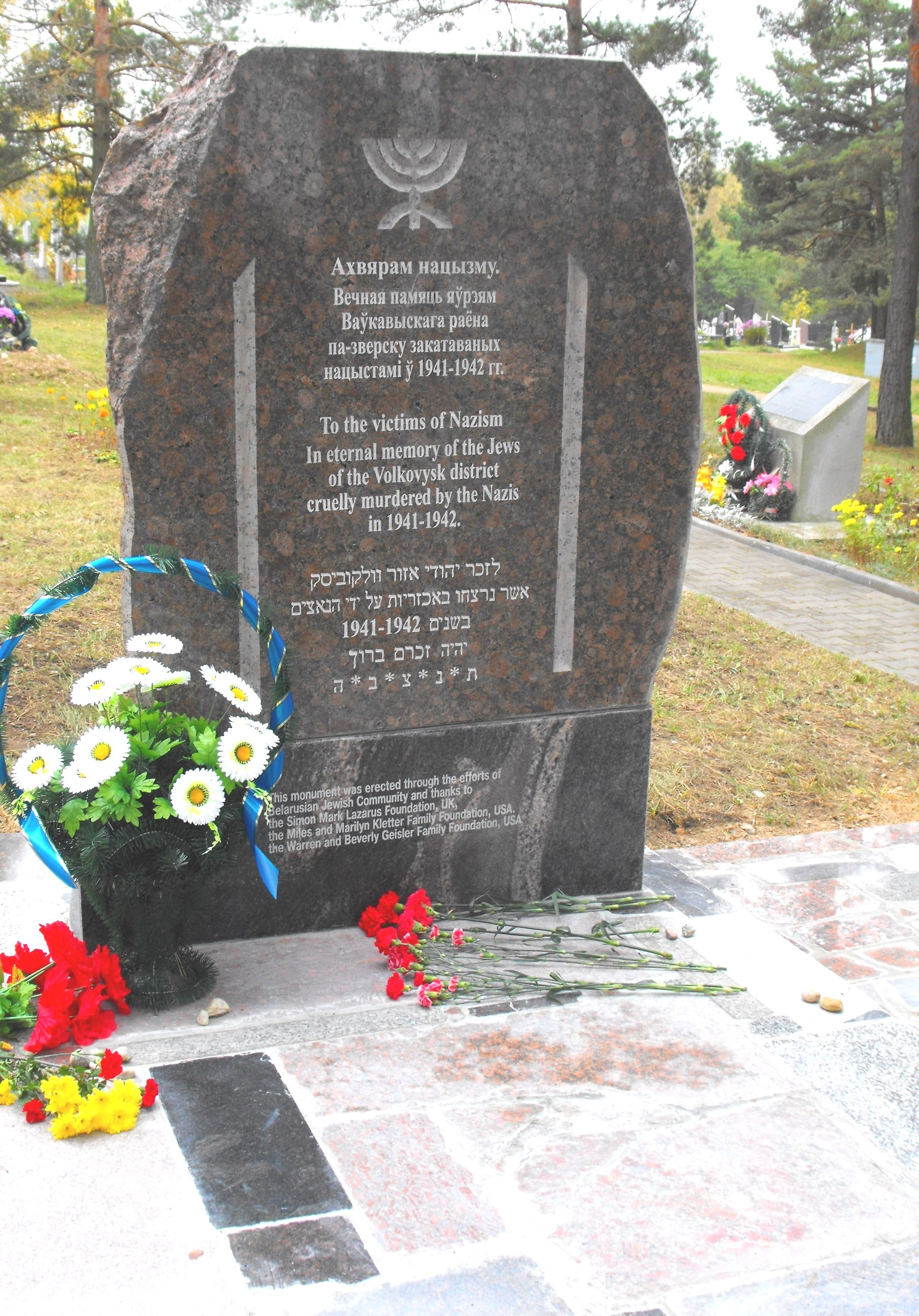 Волковыск, урочище Пороховня (территория городского кладбища). Мемориальный знак в память евреев Волковысского района, жертв гитлеровского геноцида времен Второй мировой войны. Установлен в октябре 2012 года.